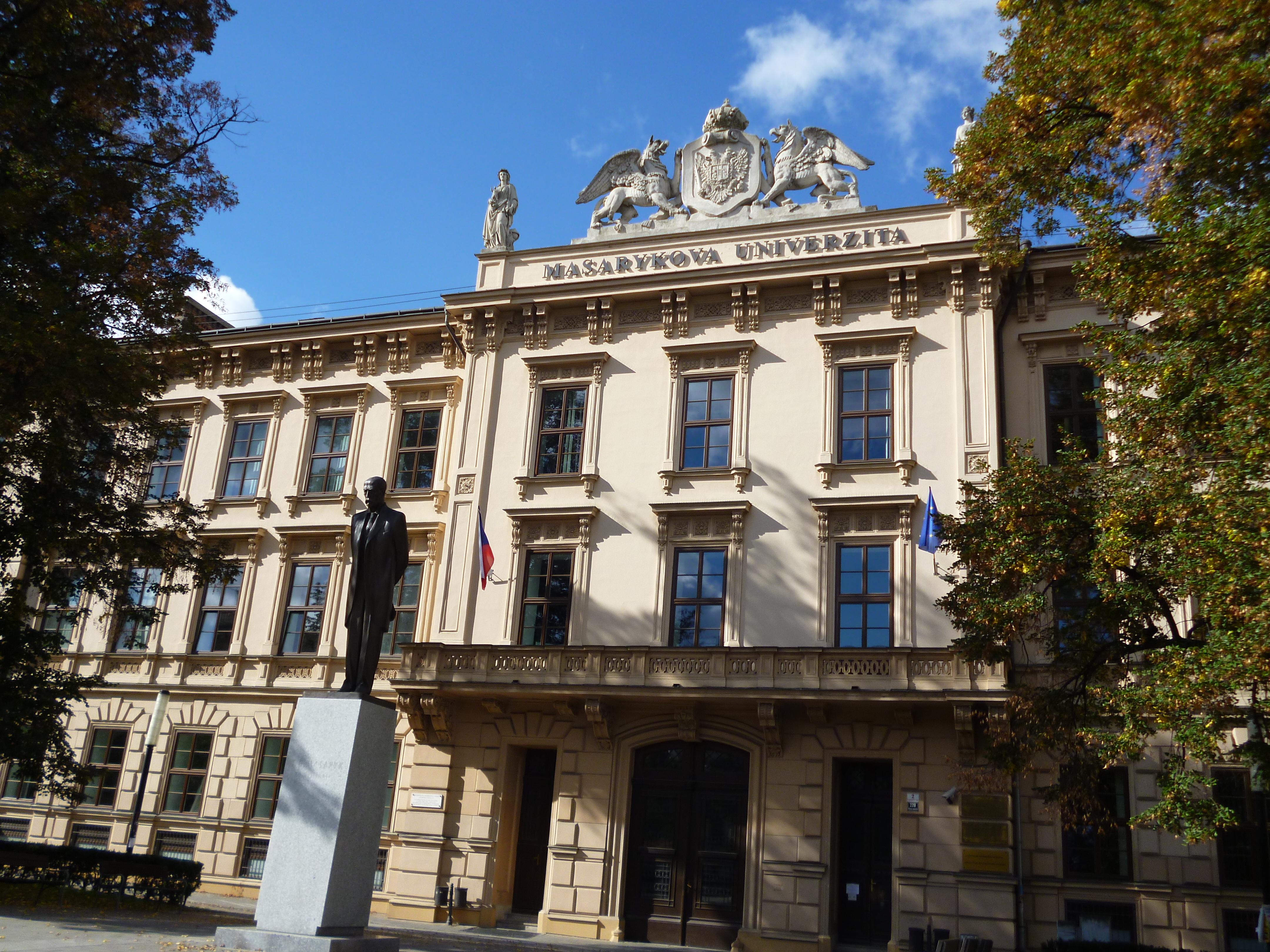 Vysoká škola - Technické učiliště, pův. lékařská fakulta MU (Brno), Brno - město, Komenského nám. 220/2, Brno